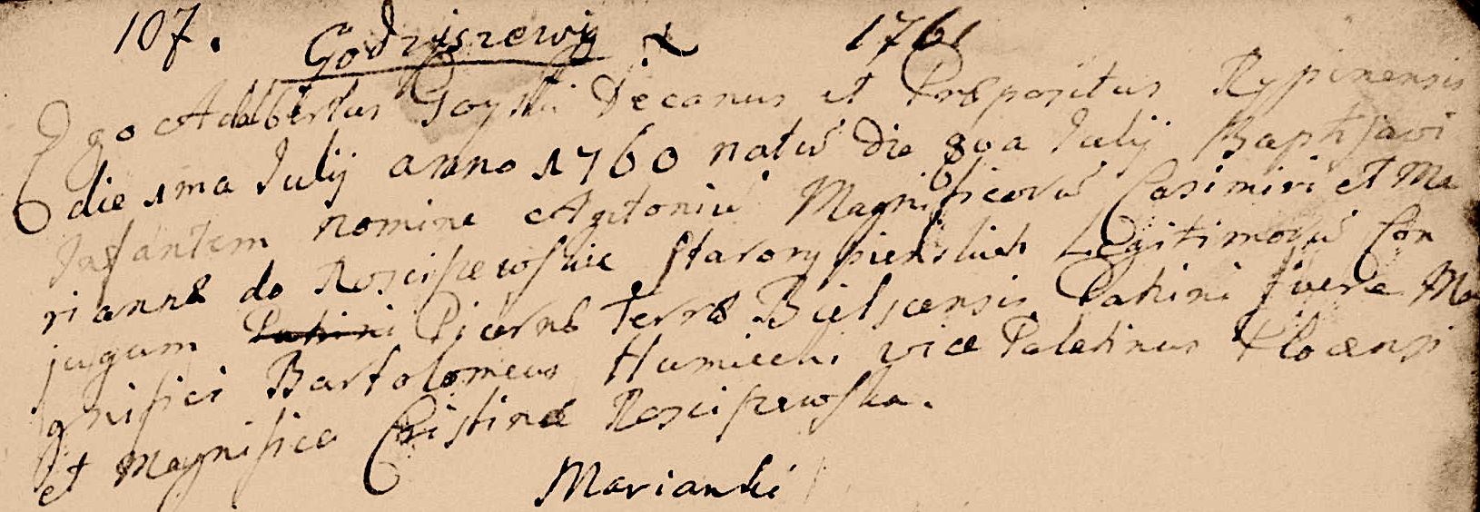 Antoni Starorypiński h. Nałęcz (1760-1830). Dziedzic dóbr Godziszewy. Pułkownik wojsk Księstwa Warszawskiego (1813 r.). Podpułkownik i dowódca 2. Batalionu w 3. Pułku Piechoty Księstwa Warszawskiego (1810 r.). Uczestnik powstania listopadowego. Akt urodzenia pułkownika Antoniego Starorypińskiego 08.07.1760 r. w Godziszewach - Archiwum Diecezjalne w Płocku.